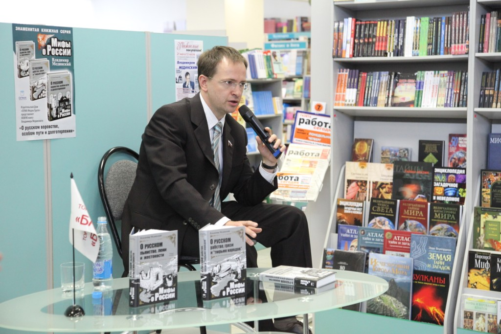 Владимир Мединский встречается с читателями в Рязани